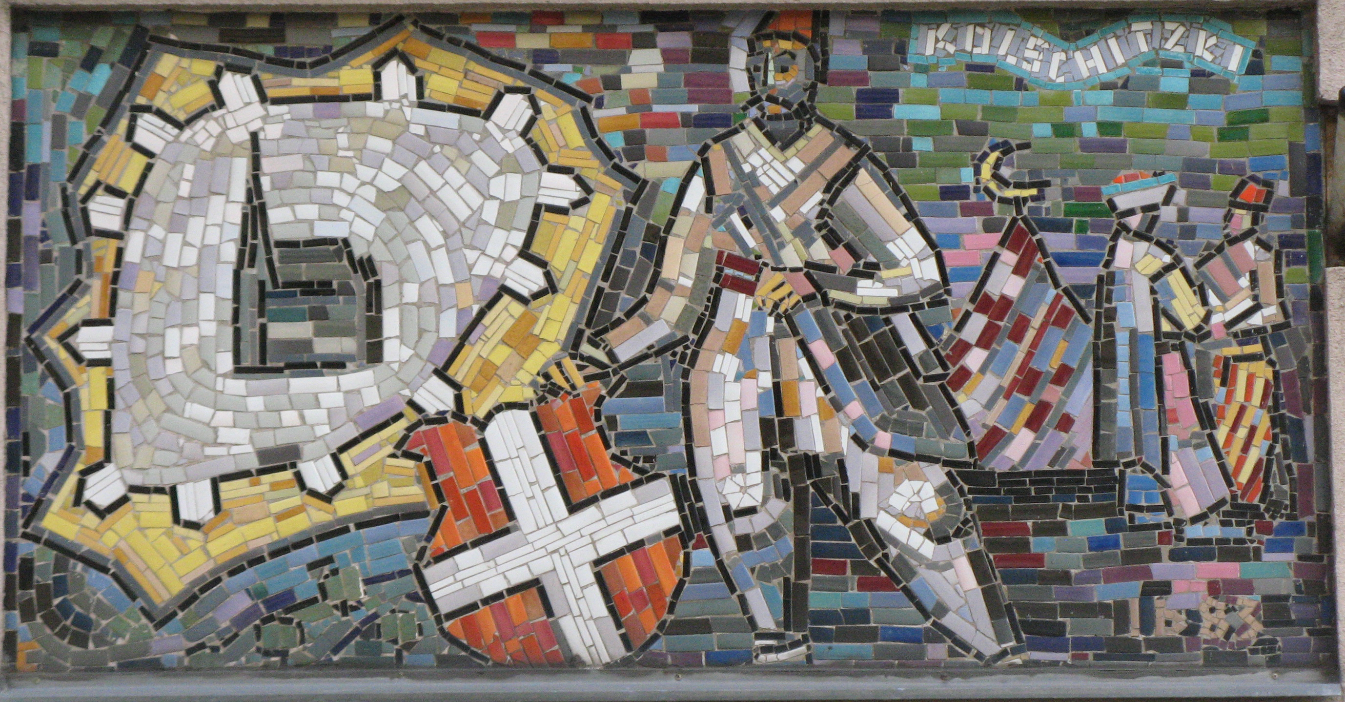 Kolschitzki, Mosaik, Laxenburger Straße 1-5, Wien-Favoriten